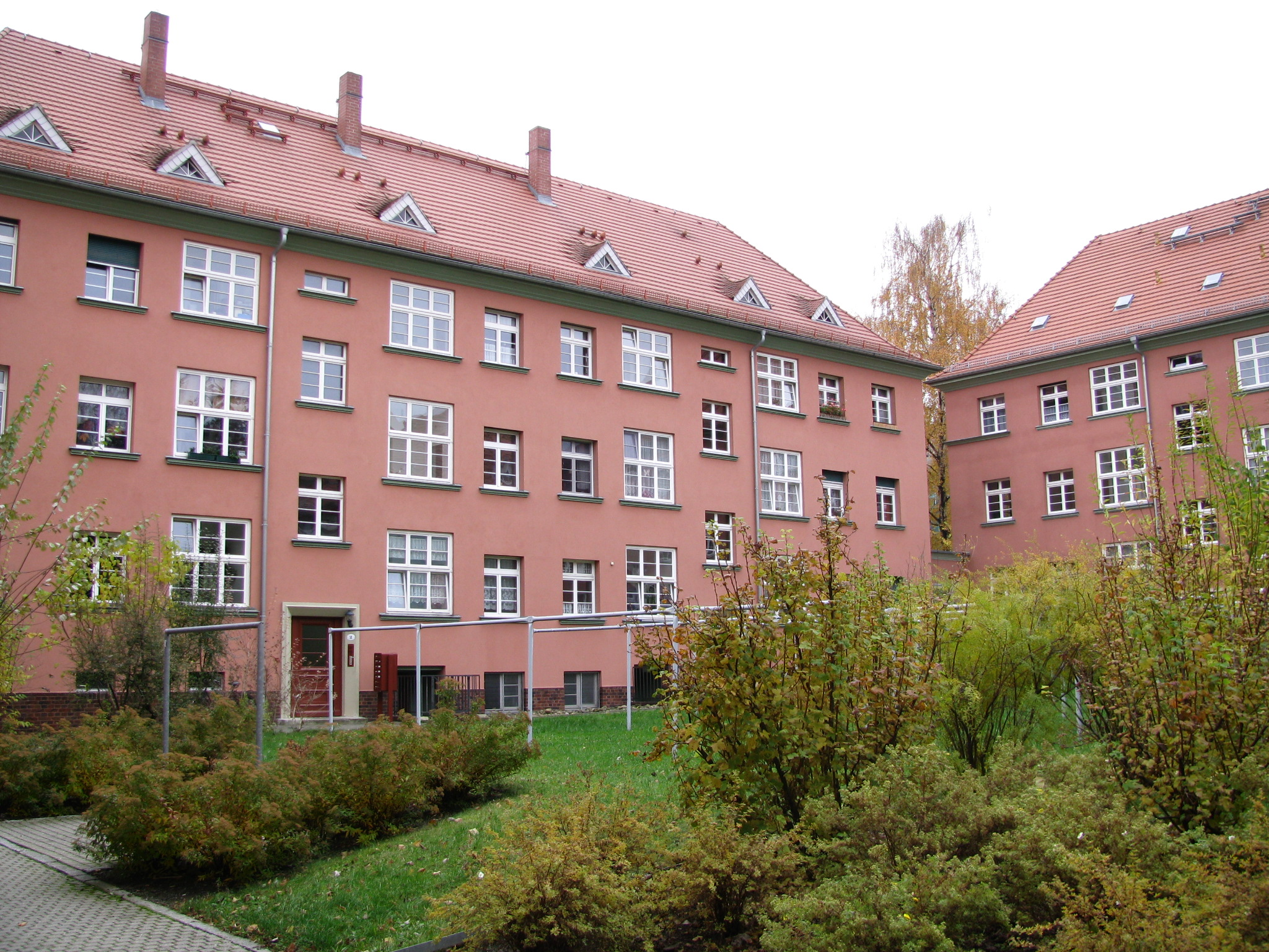 Essener Straße Ecke Malterstraße (aus dem Innenhof)